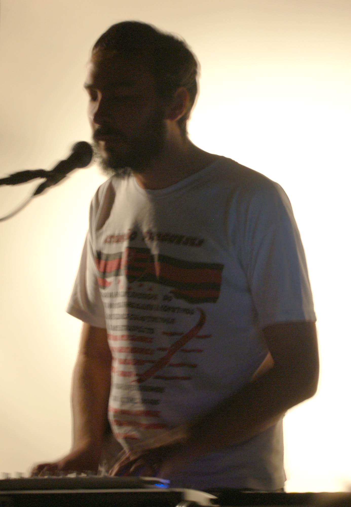 Emilio José no Culturgal 2010